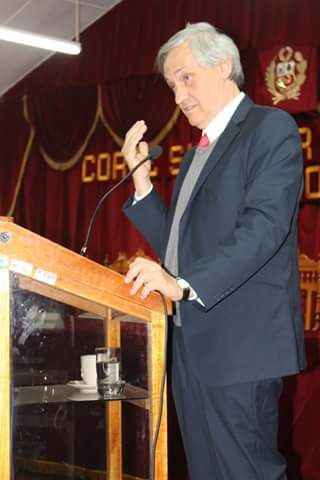 Manuel Atienza Rodriguez en la Corte Superior de Justicia de la ciudad de Puno.